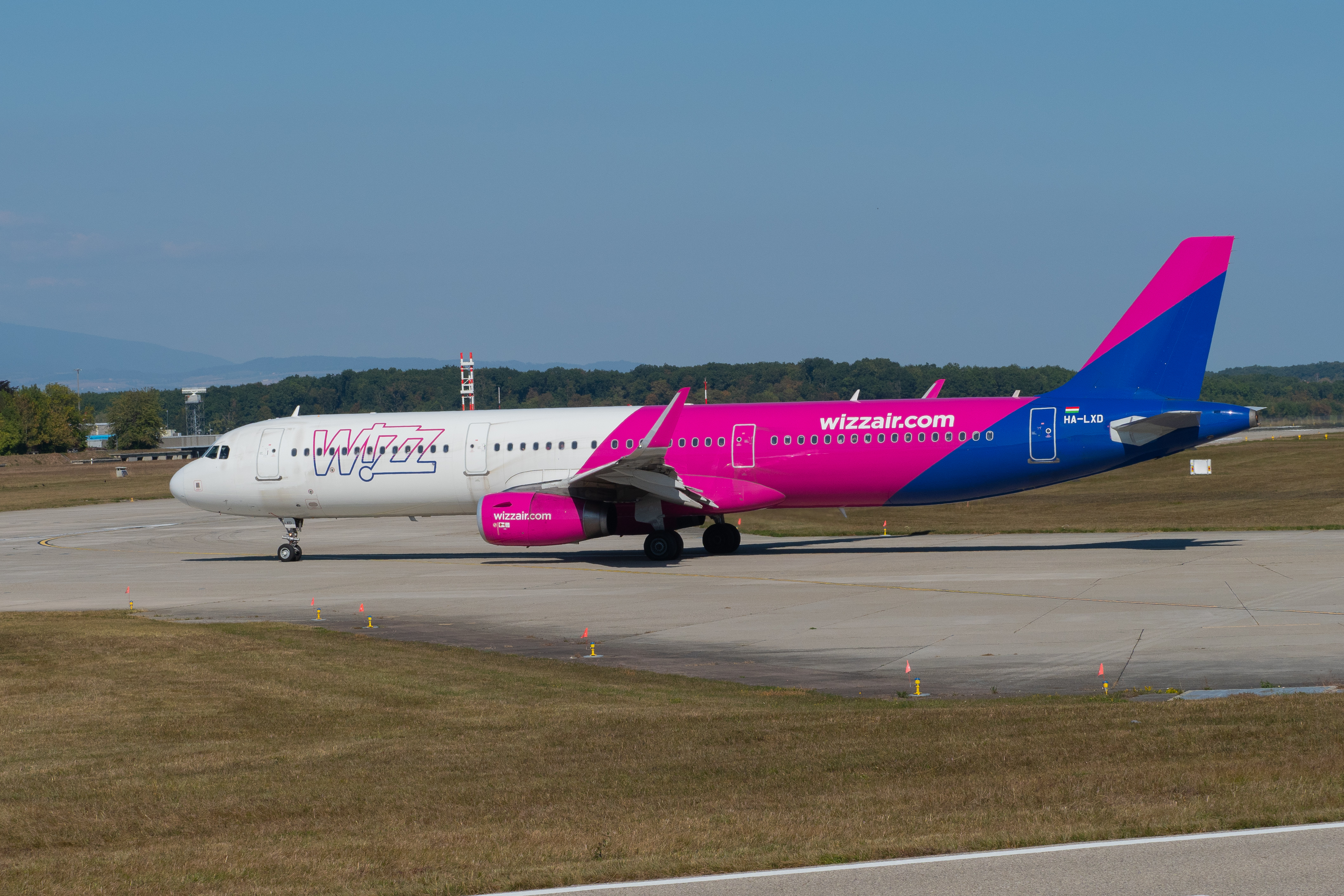 Geneva International Airport